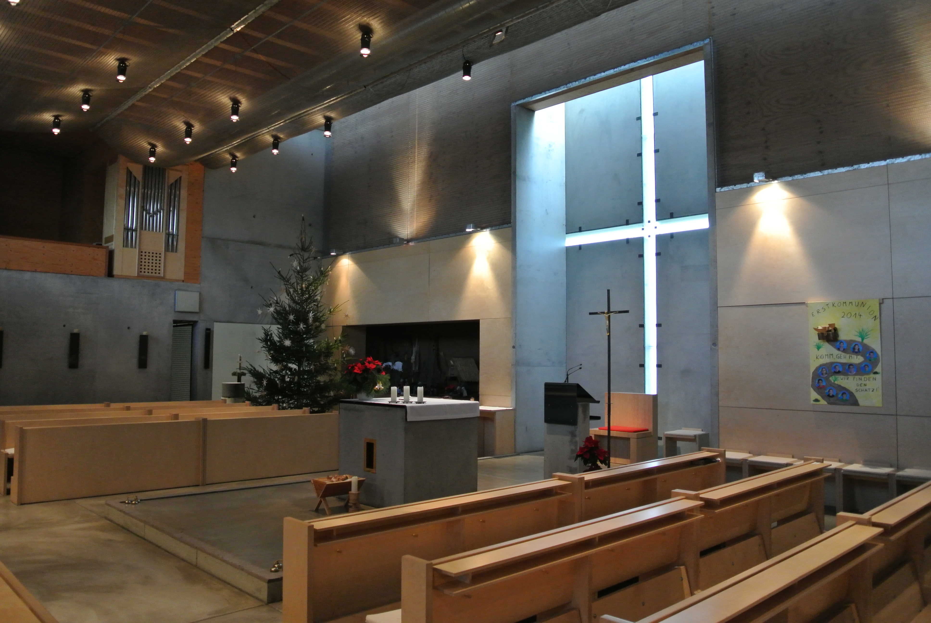 Kirche Jesus Christus, der gute Hirte in Frankfurt am Main, Nieder-Erlebach, Bauzeit: 1996-2000, Architekt: Günter Pfeifer, Innenraum